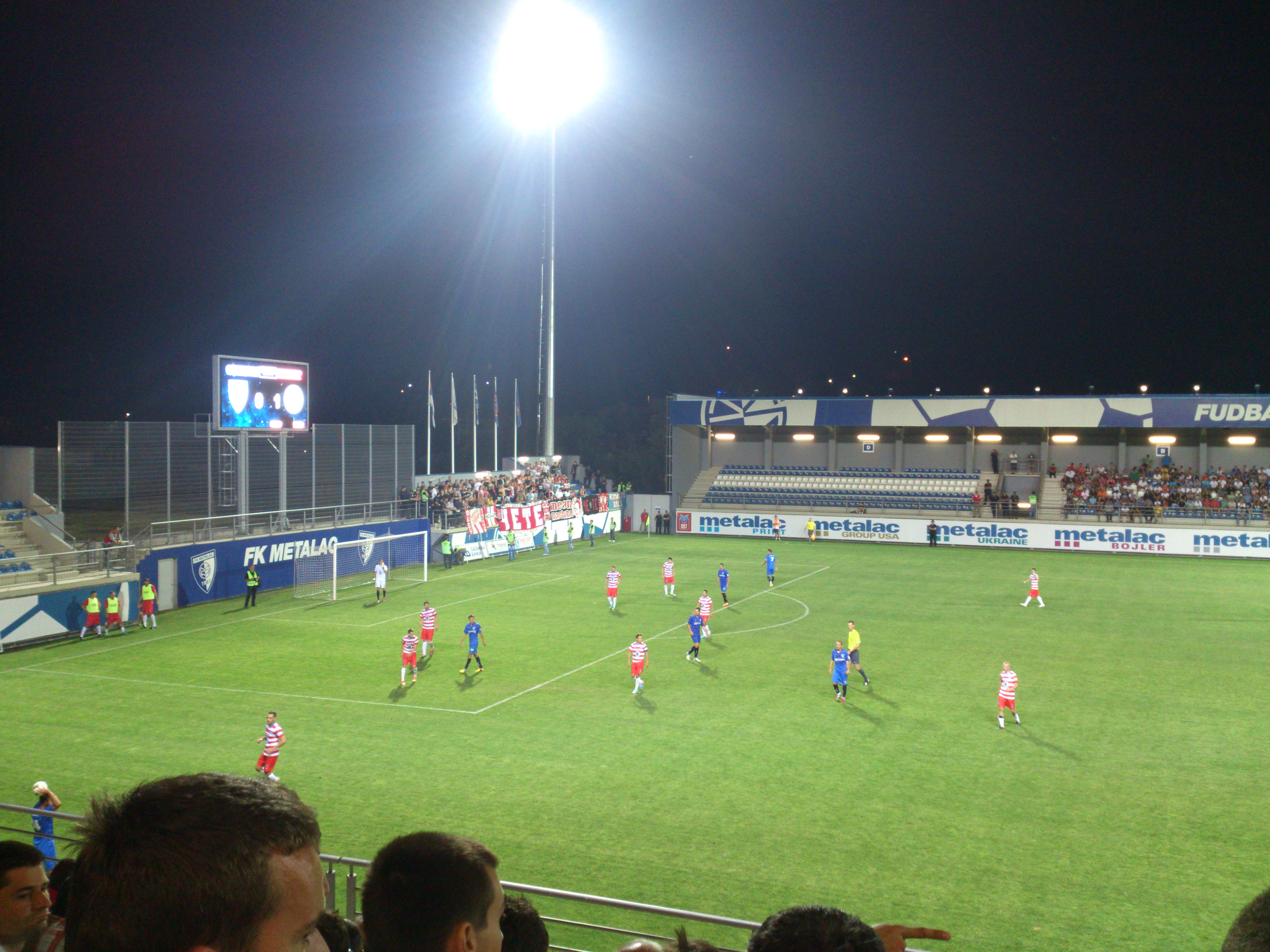 Derbi na startu sezone 2013/2014. Metalac-Borac.